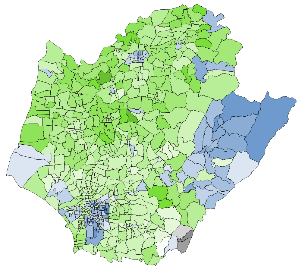 2018 台南市市長選舉各里得票